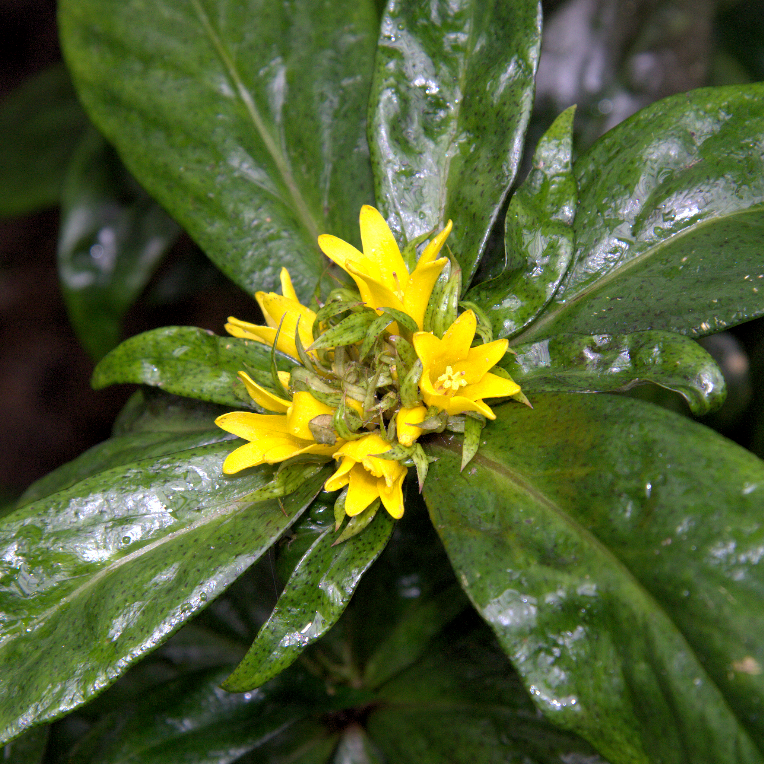 Lysimachia trientalioides